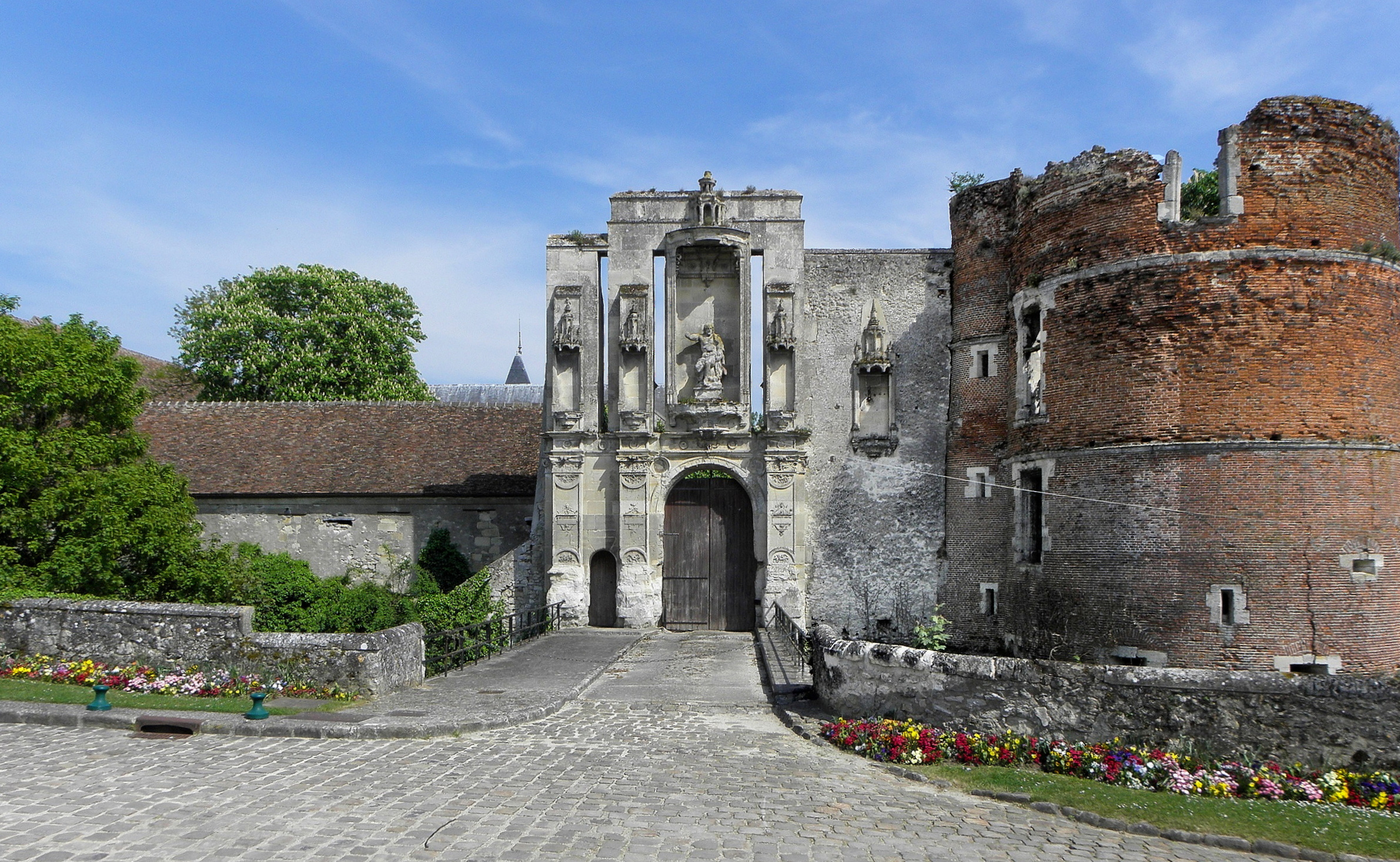 Château de Nantouillet (77).